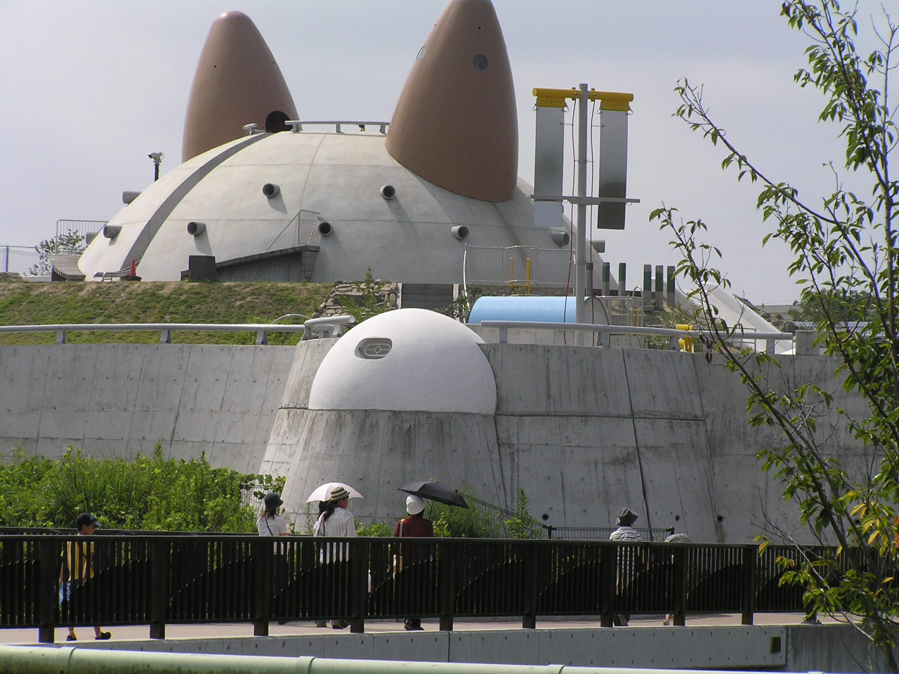 兵庫県立有馬富士公園/県内最大の都市公園/豊かな自然を活かし、「自然休養型の文化公園」を基本テーマとした広域都市公園です。多目的ホールや会議室を備えたパークセンターや、生態園、棚田、かやぶき民家などの野外施設が整備されています。(財団法人 兵庫県園芸・公園協会） ～photo by Autumn Snake 【おぉたむ すねィく探検隊】 arimahuji_park